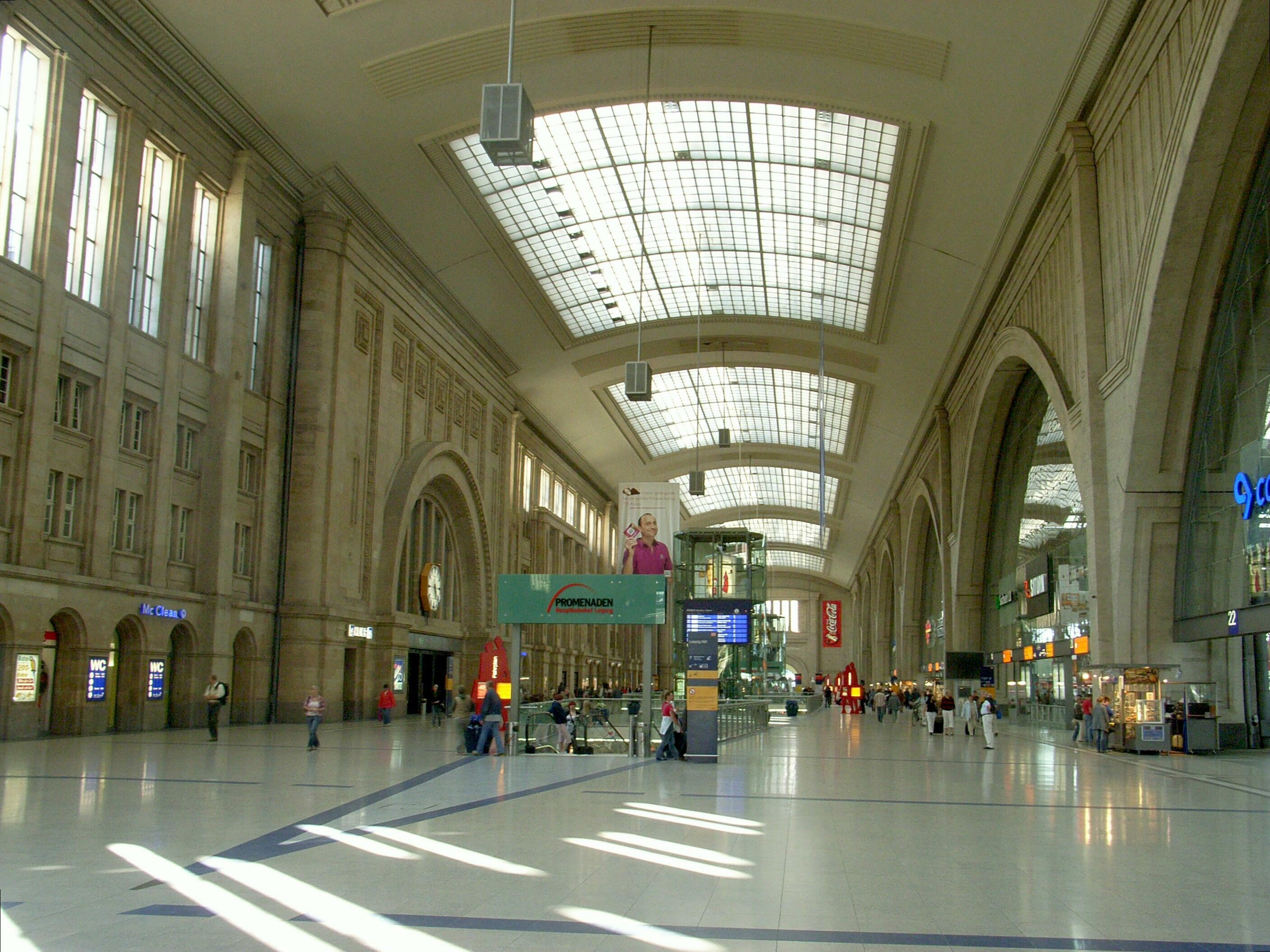 Dieses Bild zeigt die Bahnhofshalle des Bahnhofs Leipzig.